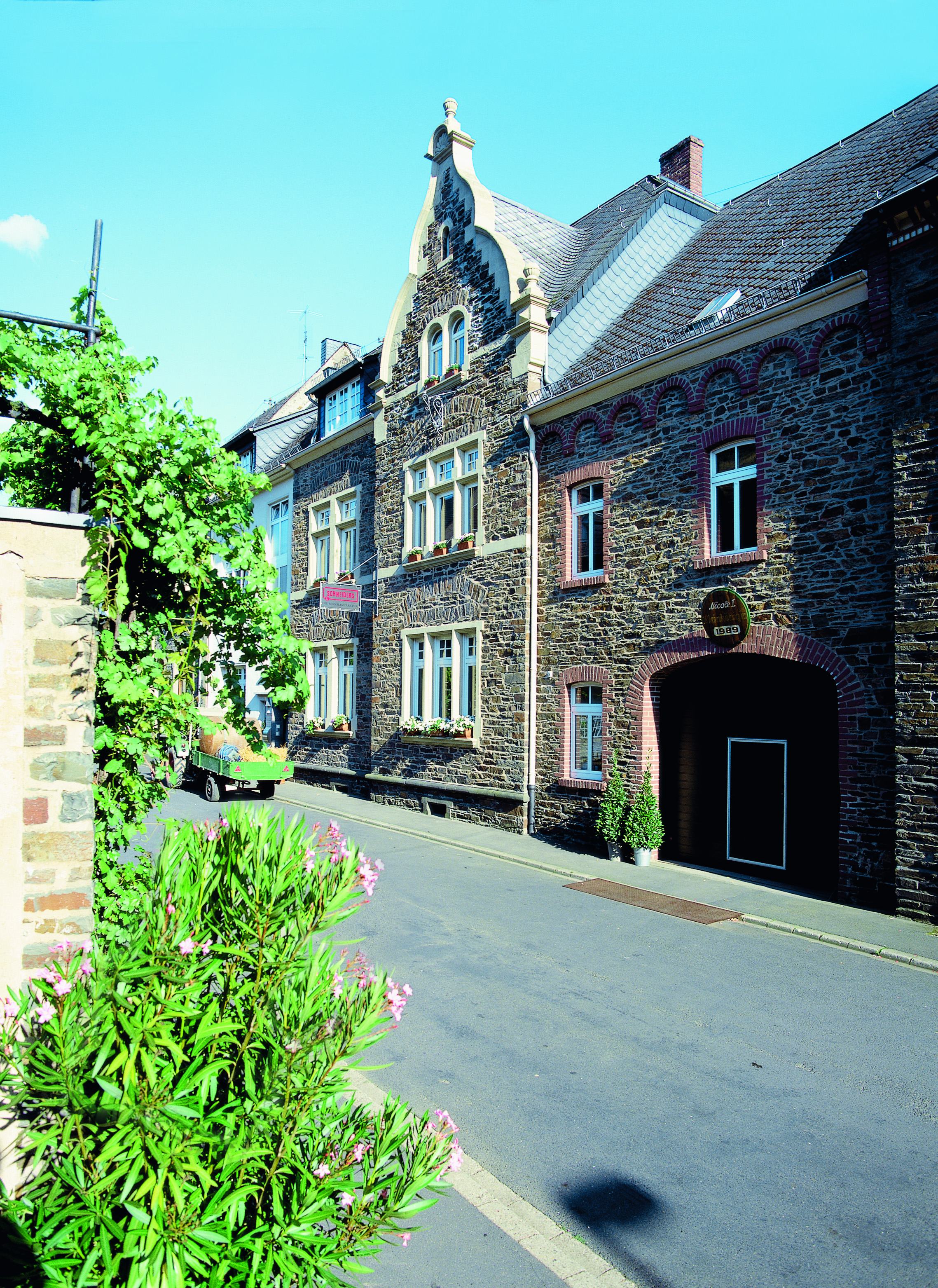 Firmensitz von Schneiders "Die Weinmanufaktur"